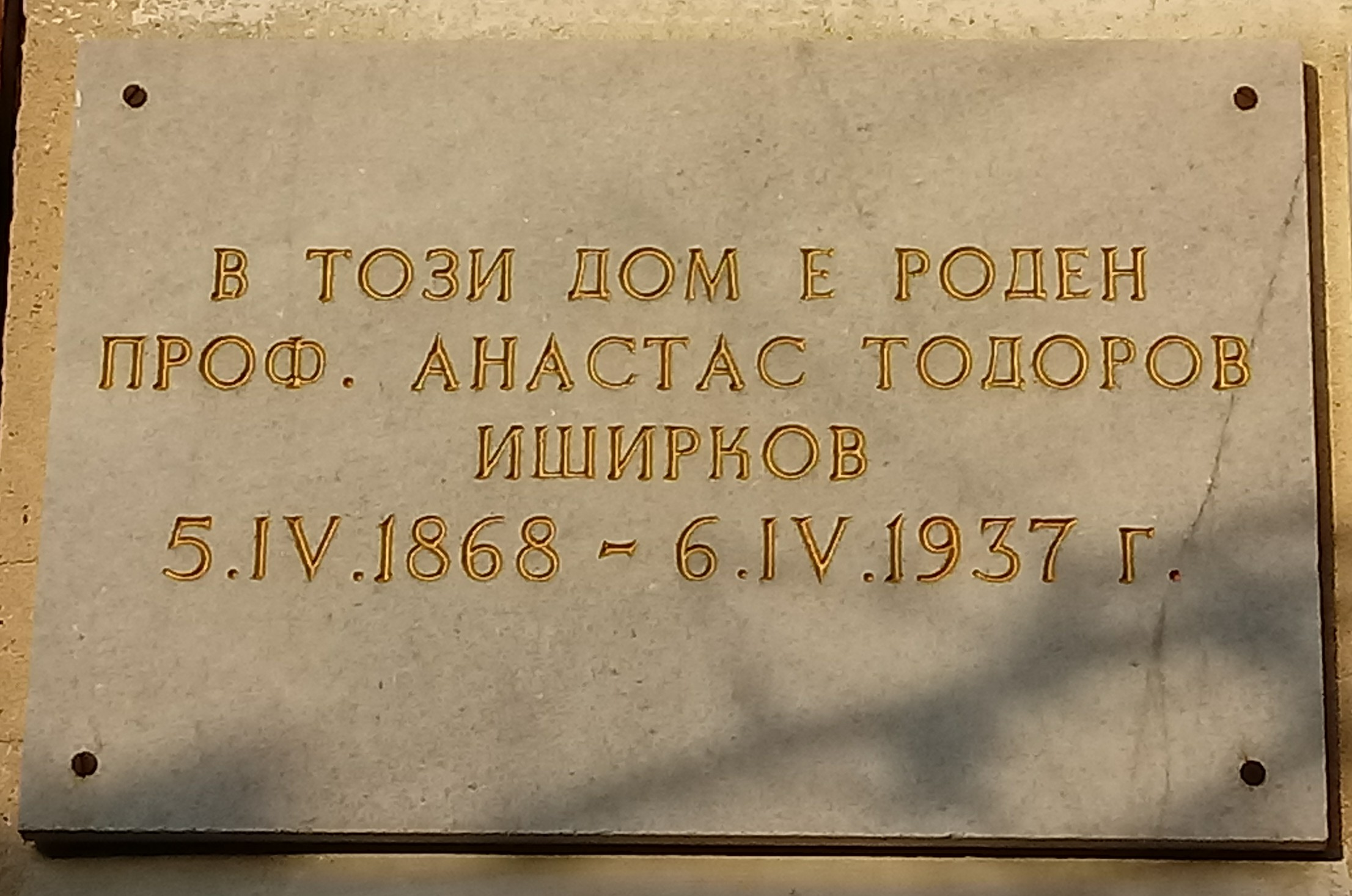 Anastas Ishirkov memorial plaque, Lovech